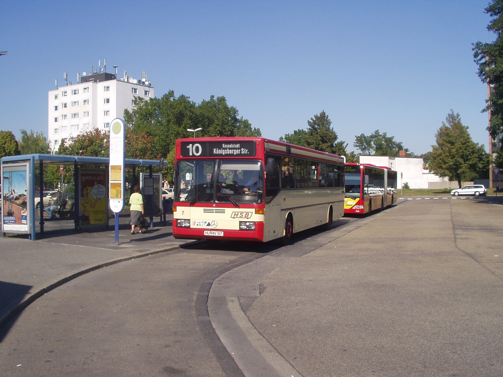 Wagen 7 der HSB ist am 1.10.2005 auf der Linie 10 eingesetzt, hier zu sehen am Hanauer Hauptbahnhof. Während dieser noch die klassische rot-creme Farbgebung der HSB trägt, ist der im Hintergrunde zu sehende O 530 G bereits im neuen, rot-gelben Schema (analog zu den Stadtfarben) lackiert.